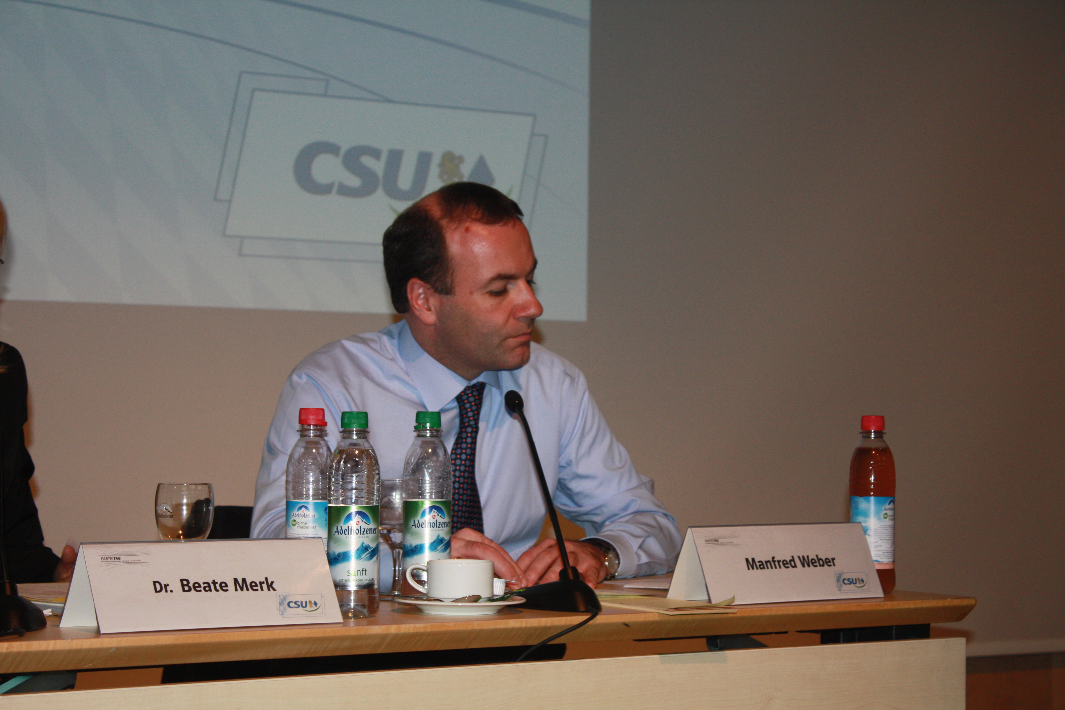 Manfred Weber auf dem CSU-Parteitag am 12. Dezember 2014 in Nürnberg